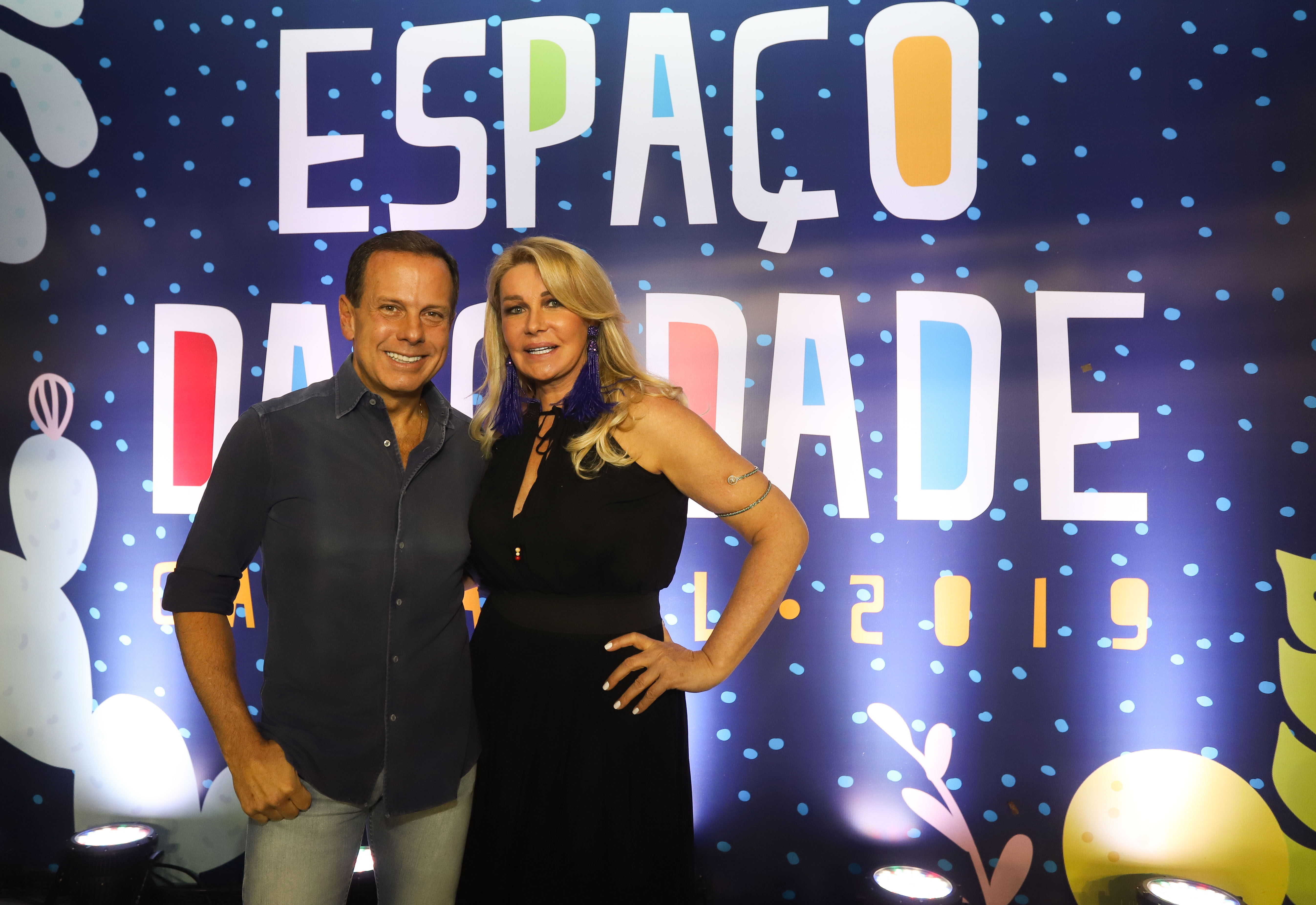 O governador do Estado de São Paulo, João Doria e a primeira-dama do Estado de São Paulo, Bia Doria, assistem ao Carnaval de São Paulo no Sambódromo. Local: São Paulo/SP. Data: 02/03/2019. Foto: Gilberto Marques